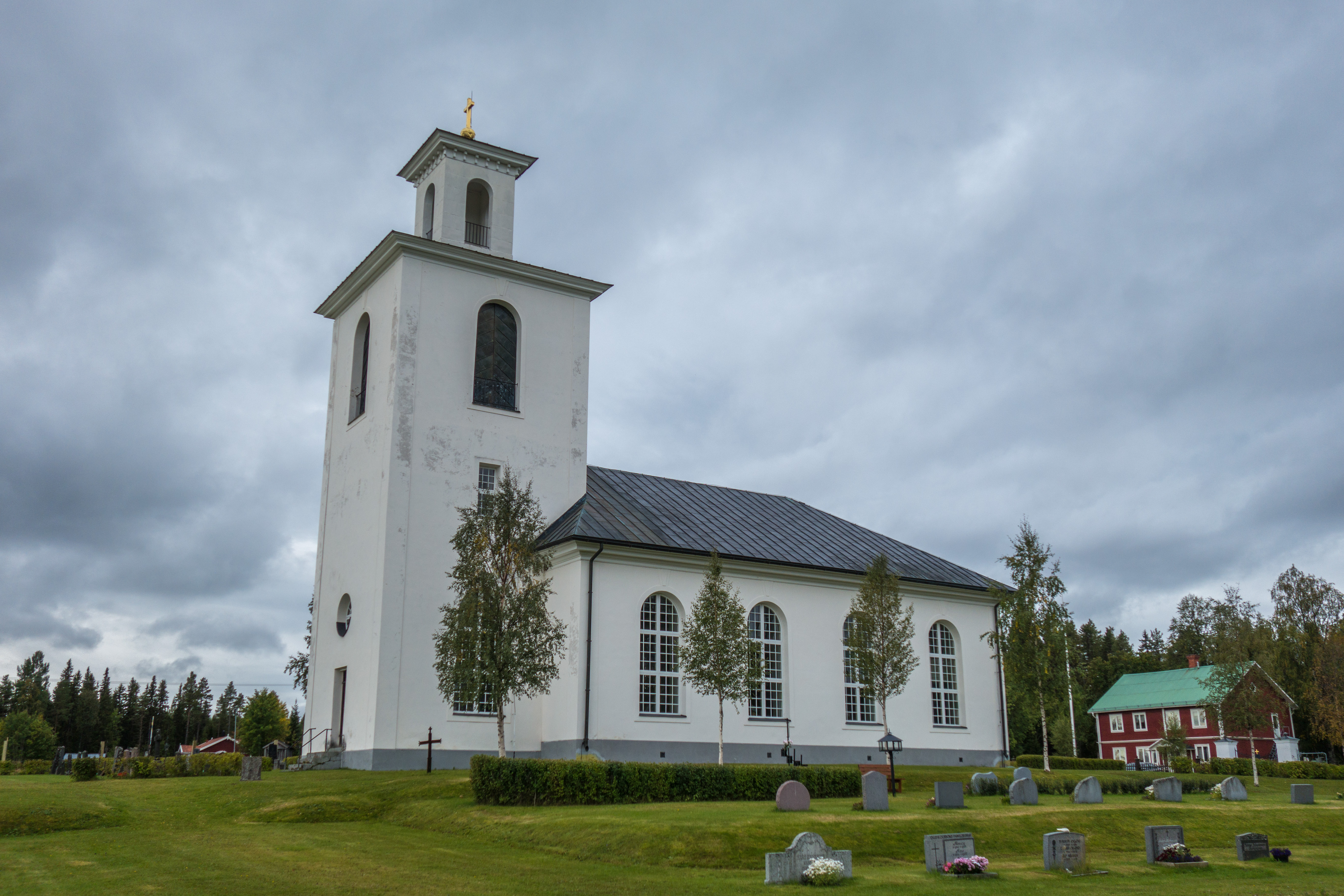 Kyrkås nya kyrka är en kyrkobyggnad i Häggenås-Lit-Kyrkås församling